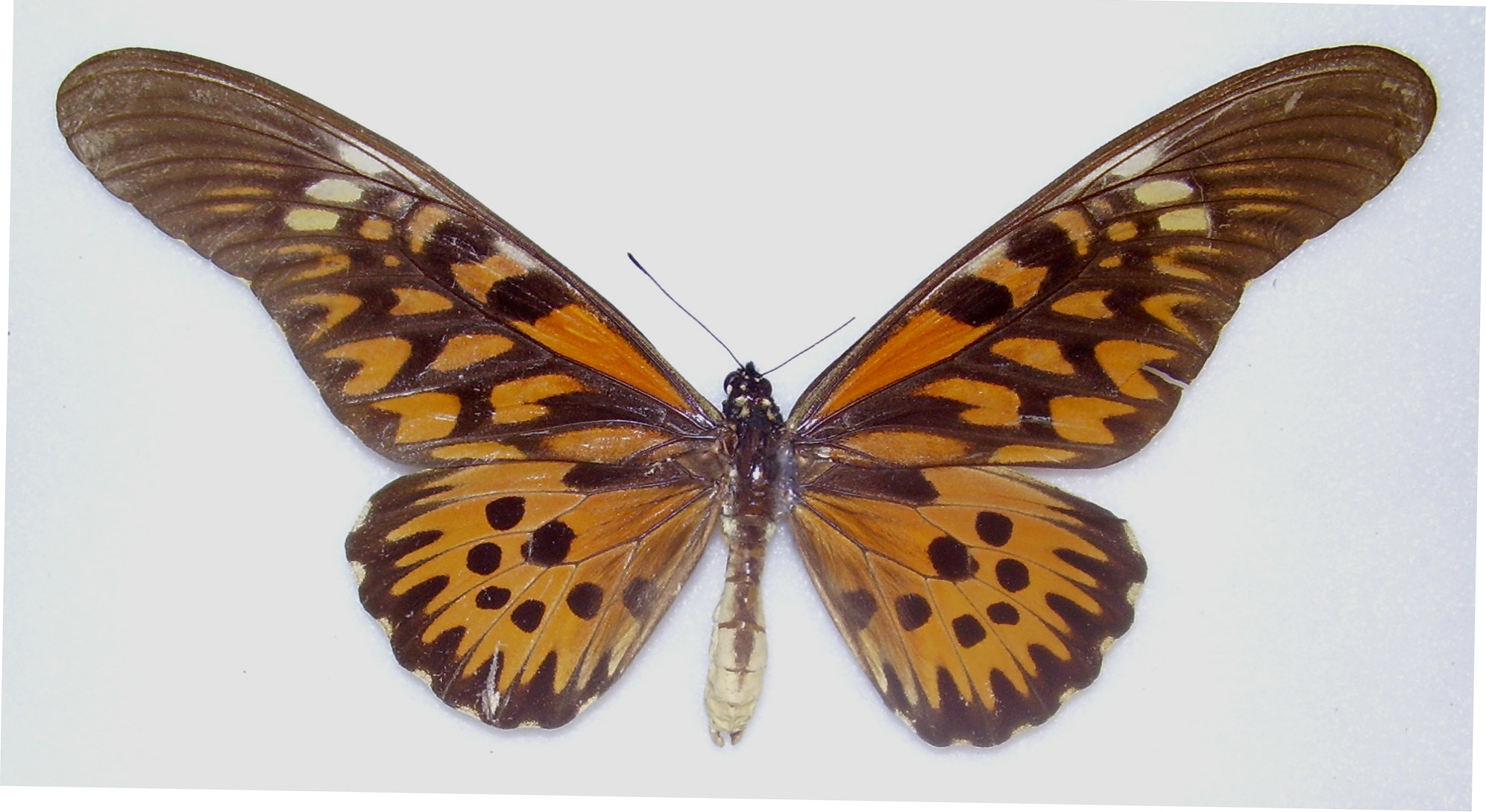 Papilio antimachus Male, upperside. Central African Republic